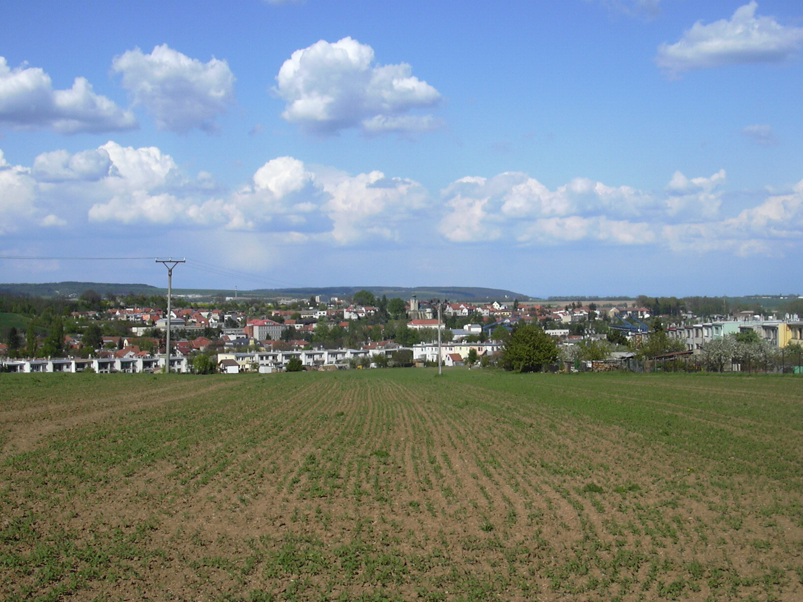 Celkový pohled na Drnovice (Vyškov District, Czech Republic)